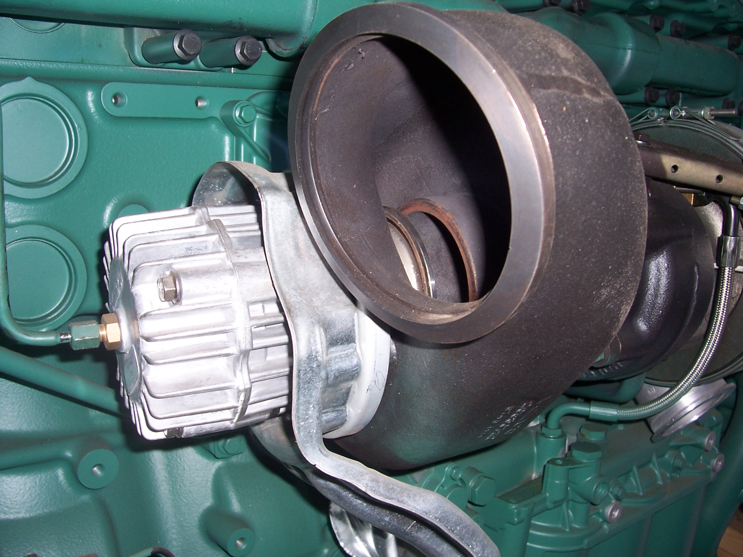 Close up of diesel engine variable exhaust brake